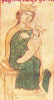 Betarix z Rethelu s dcerou Konstancií